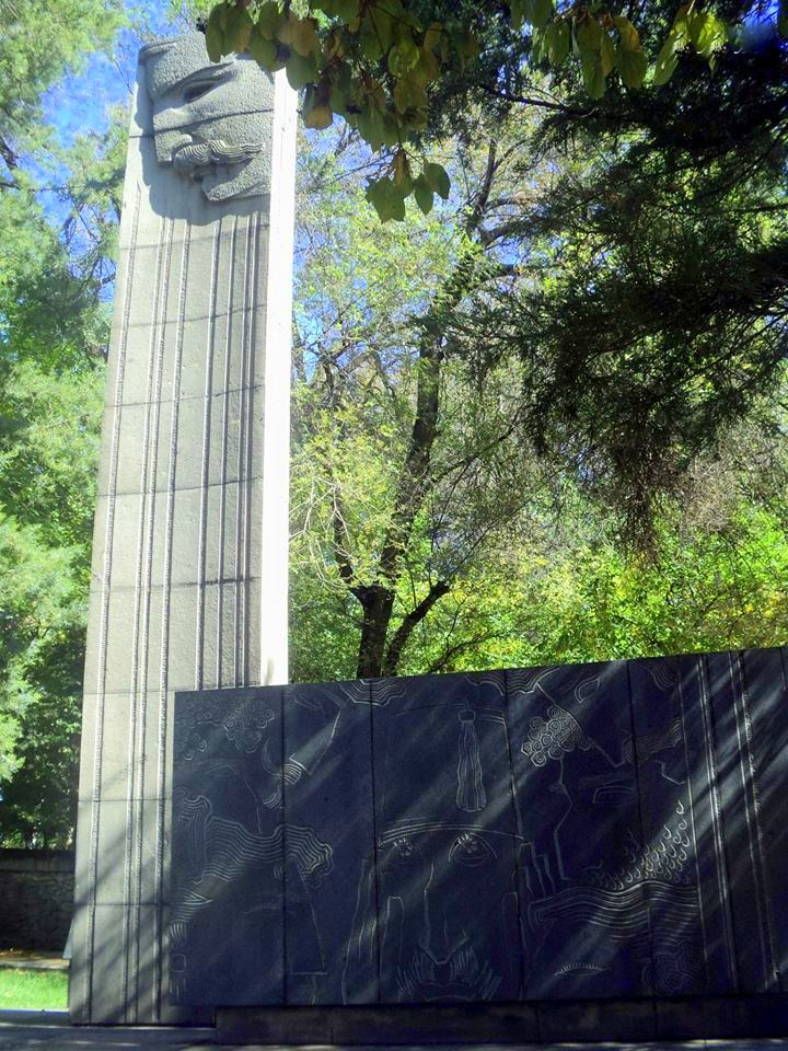 Monument to Hakob Paronyan, Yerevan, Arabkir, 1965 12/12